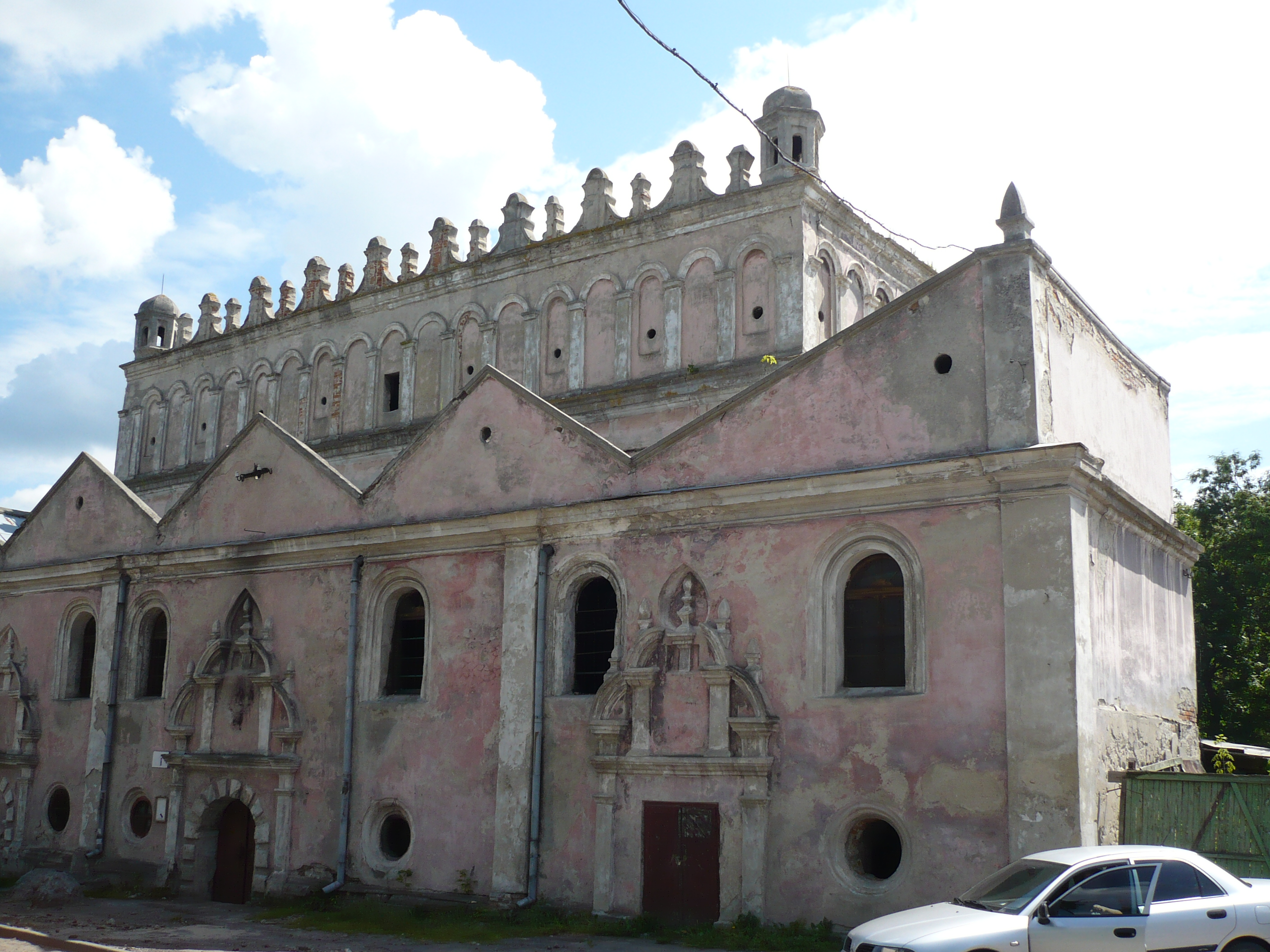 Synagoga